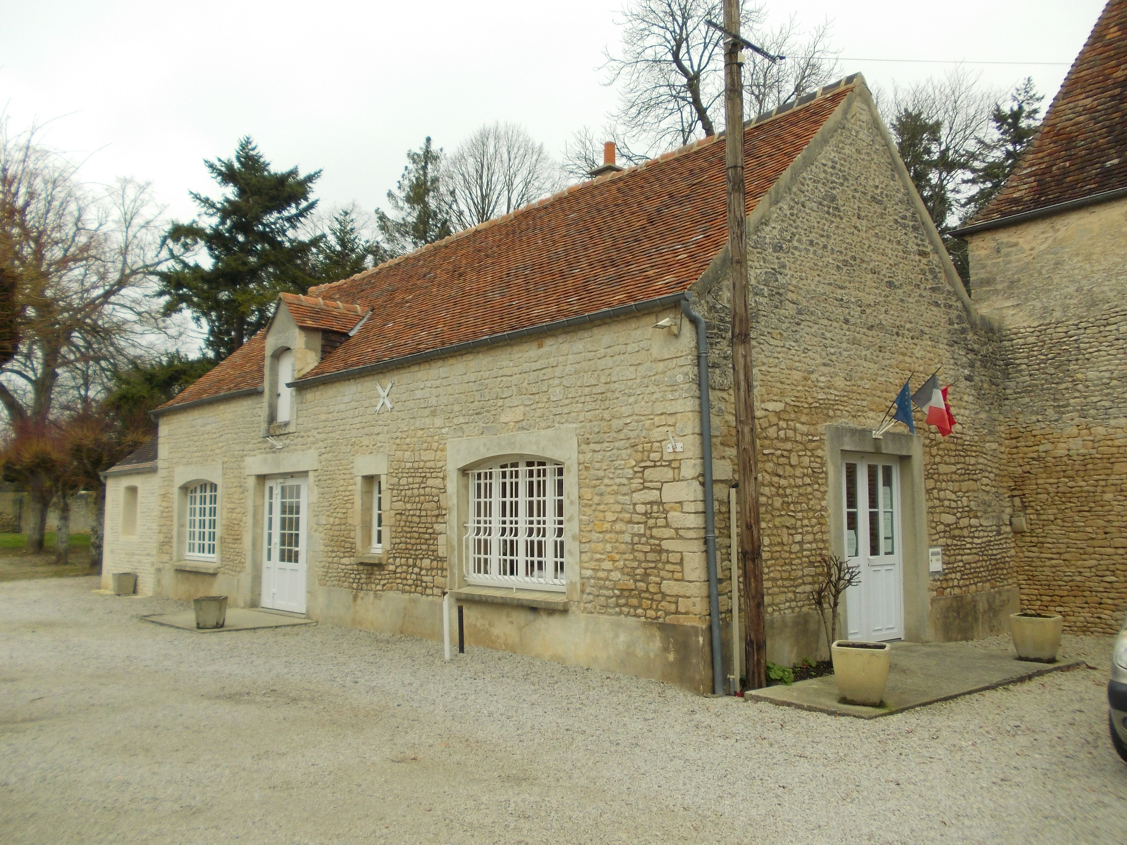 mairie d'Aubigny